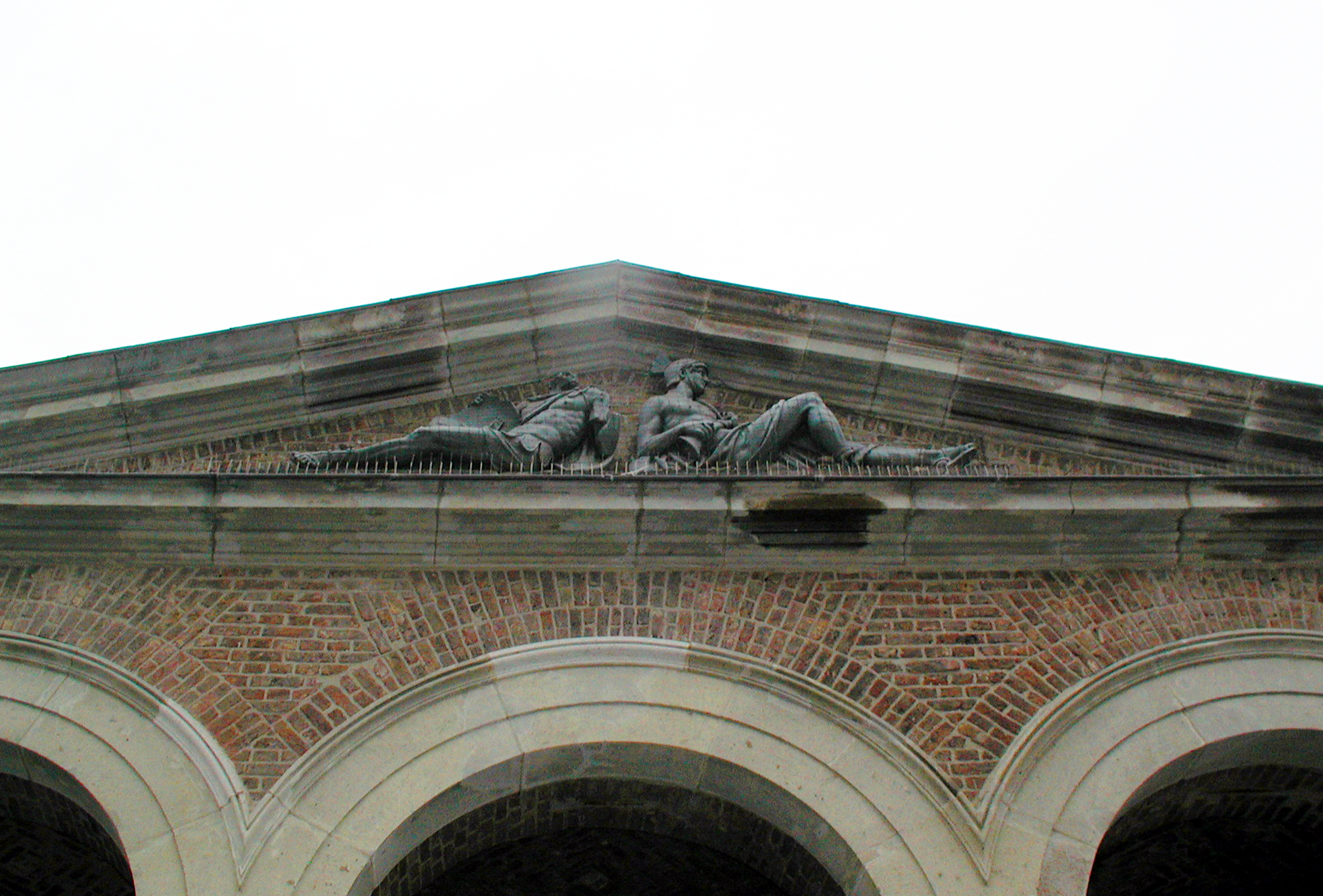 Giebelfries des Portikus eines zerstörten preußischen Wachgebäudes am Kölner Waidmarkt